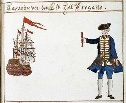 Capitaine von der Elbzollfregatte, 1770. Dargestellt ist die bereits 1757 außer Dienst gestellte Elbzollfregatte Weißes Ross mit ihrem Kommandanten Joachim Wilhelm Brockes.